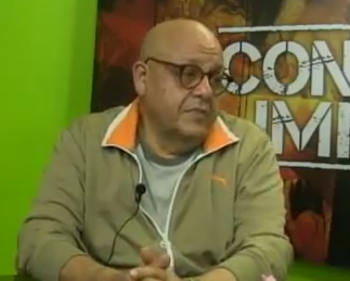 Video.mp4 snapshot 01.53 (2020.05.05 20.51.54) Juan Carlos Ferrando en una entrevista con Gio Infante para lamula.pe